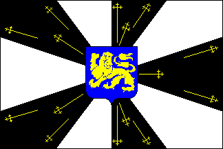 Vlag van de gemeente Galmaarden